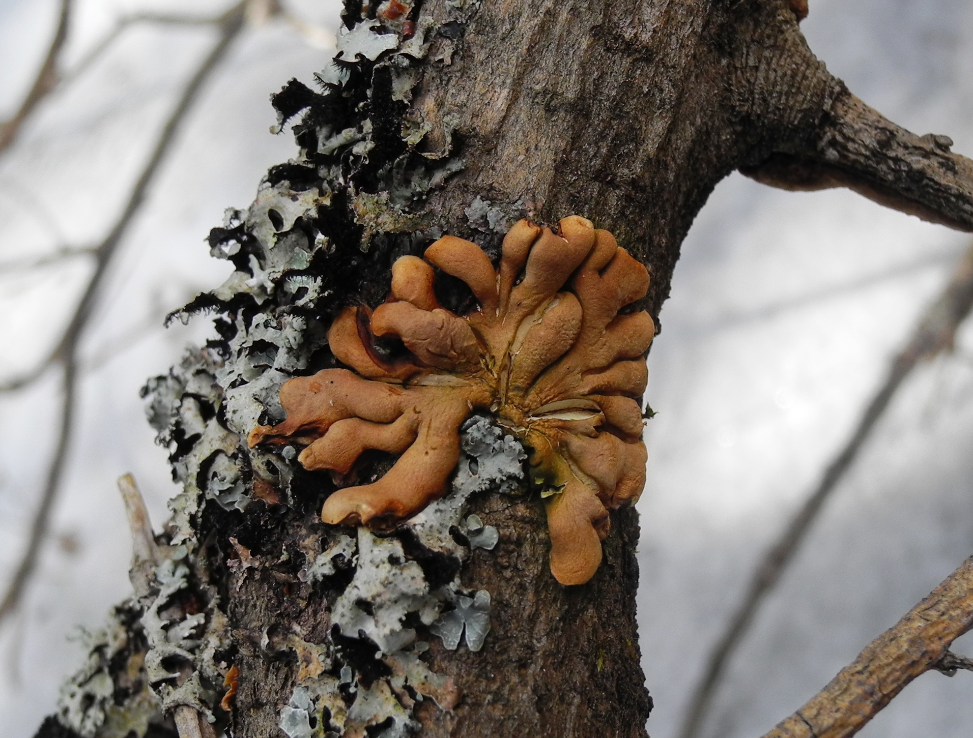 Trollhand (Hypocreopsis lichenoides)